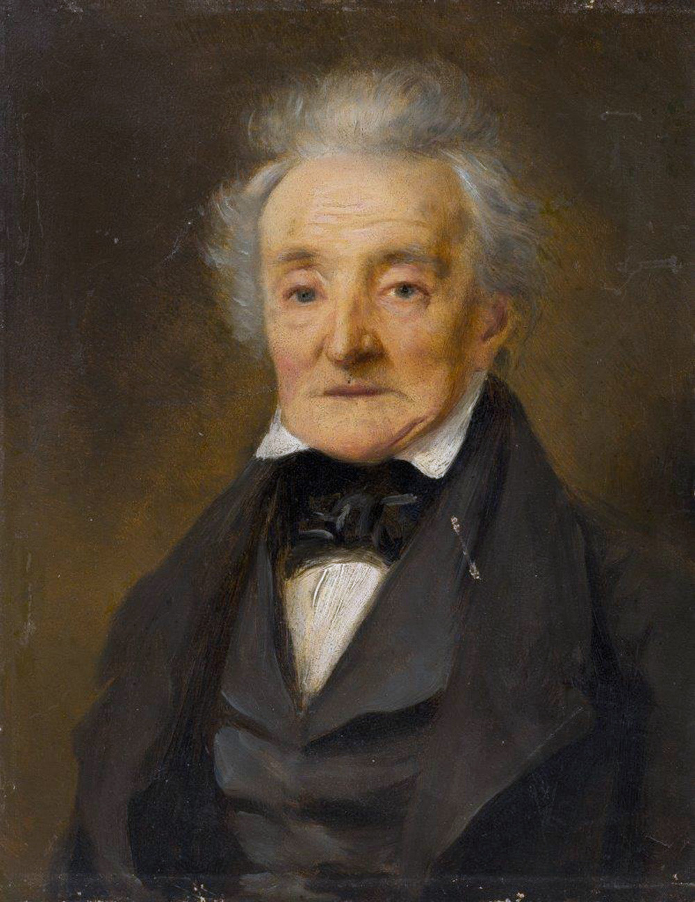 Depicted person: Wilhelm Friedrich Ernst Bach